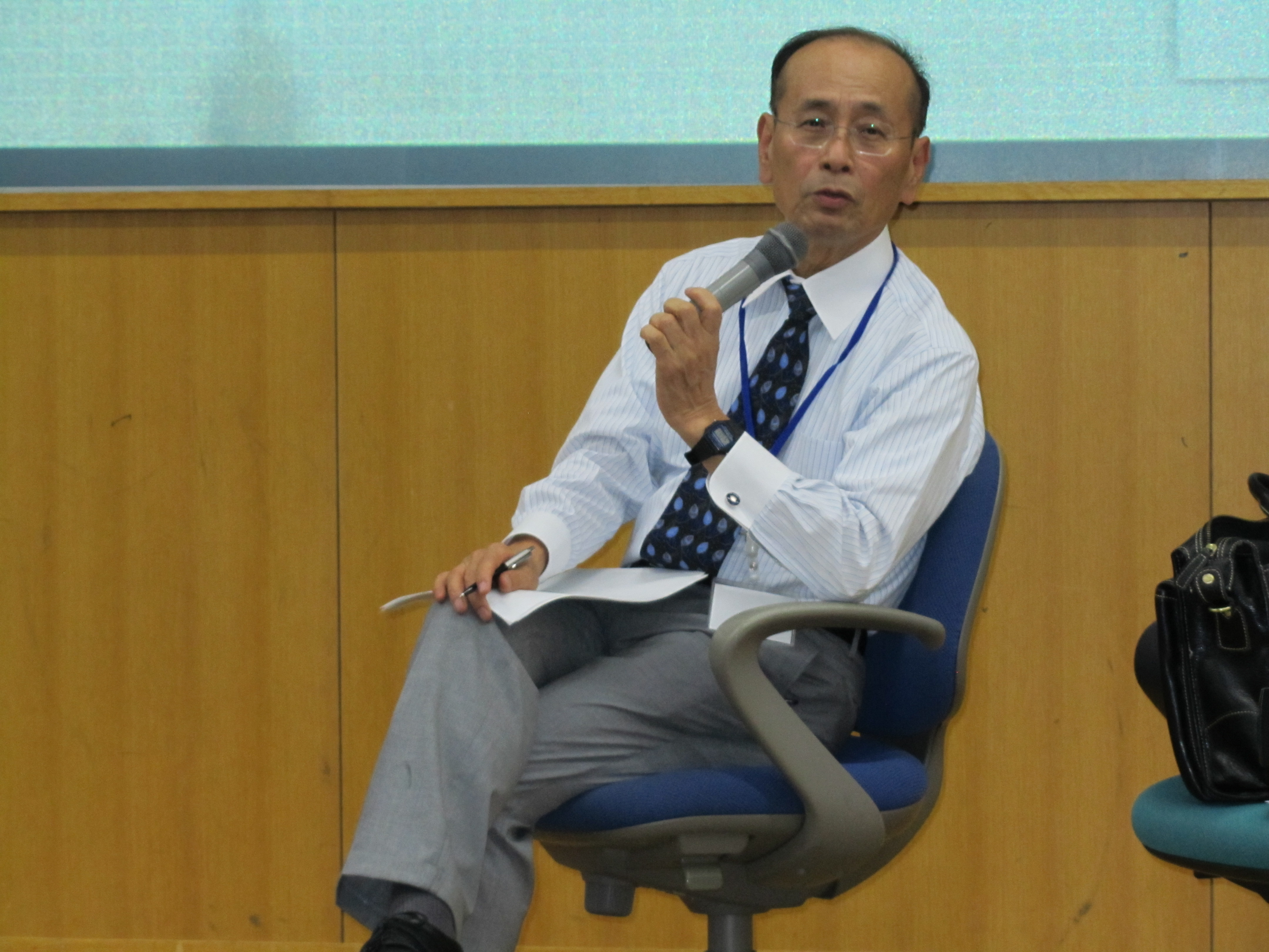 題名：講演中の孫崎享先生 場所：第10回東京平和映画祭＠国立オリンピック記念青年総合センター 日時：2013年9月21日